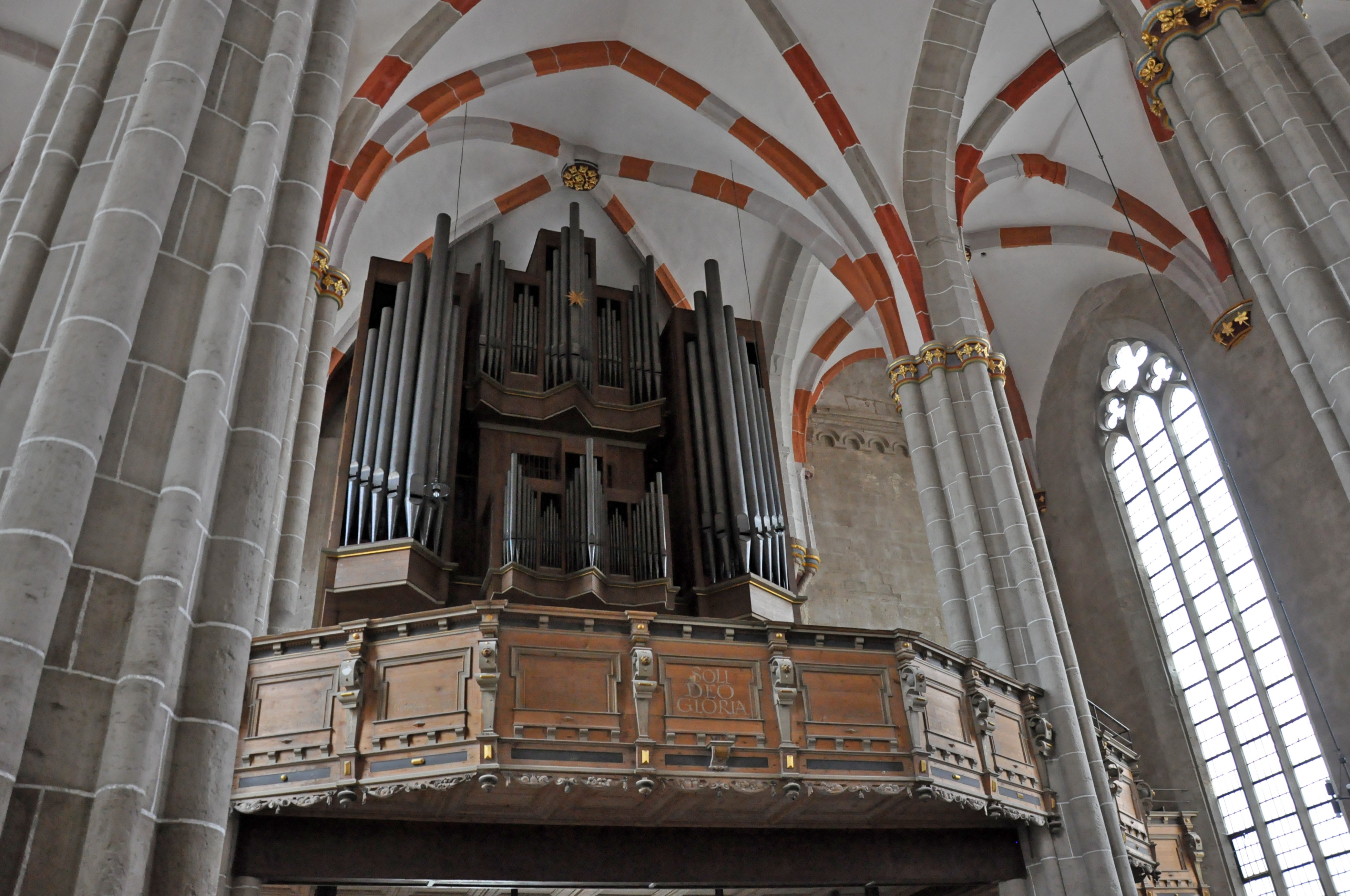 Orgel in Divi Blasii Mühlhausen/Thüringen, Deutschland